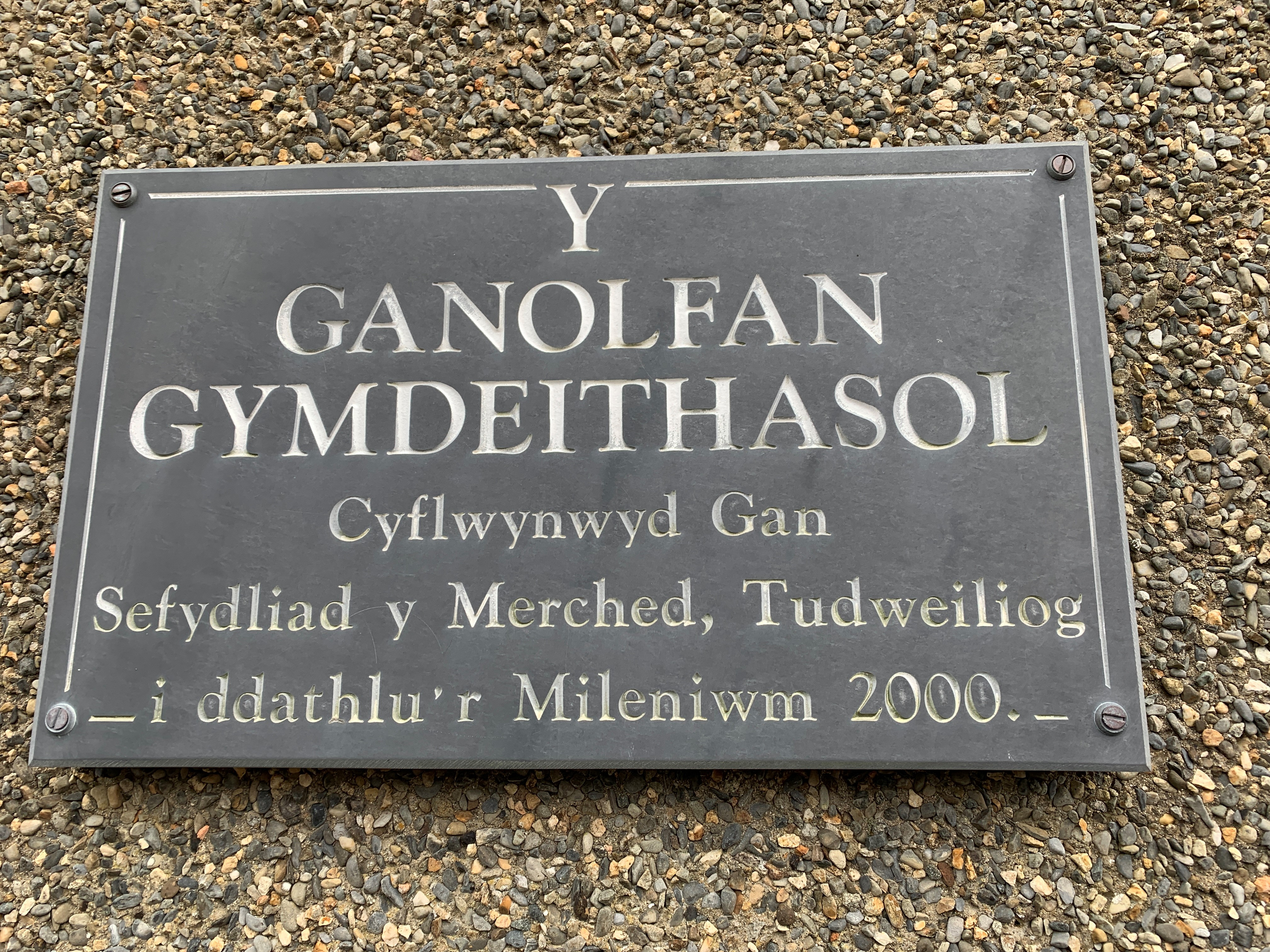 Y Ganolfan